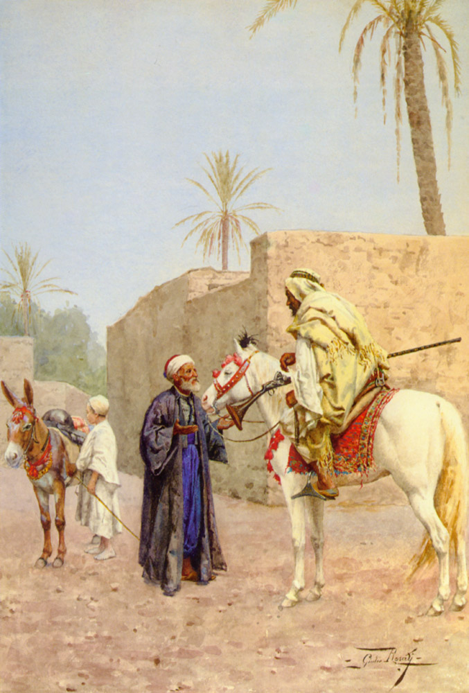 La discussion.title QS:P1476,fr:"La discussion." label QS:Lfr,"La discussion."